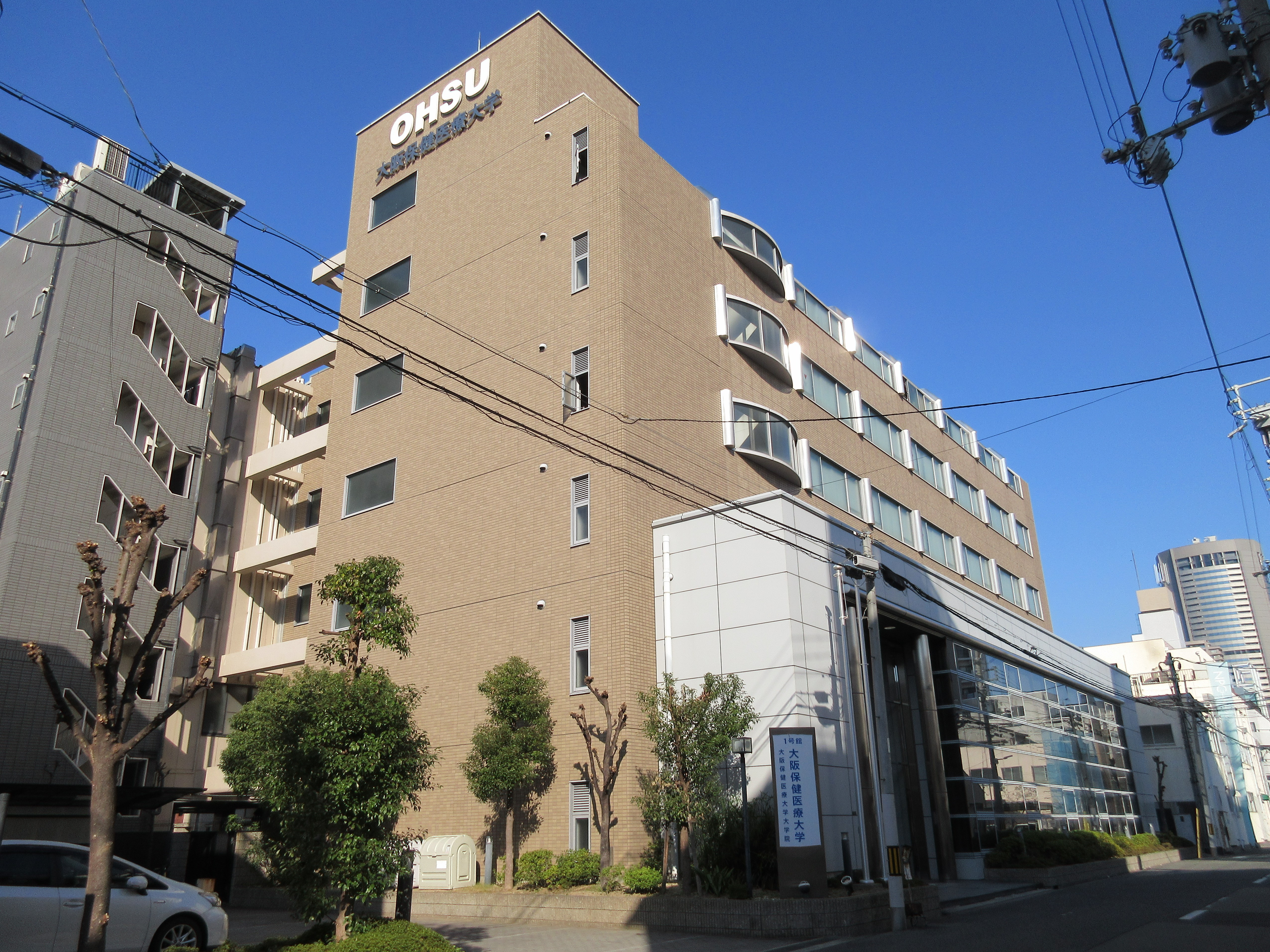 大阪保健医療大学